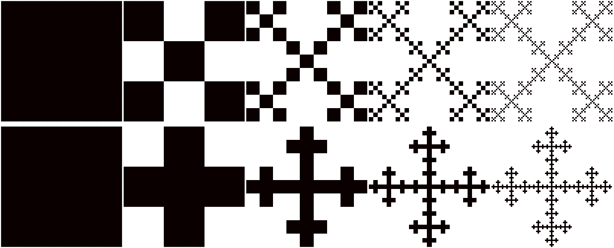 Primeras 4 iteraciones del fractal de Vicsek. Forma intercalada (superior) y forma de cruz (inferior) del fractal. Generado por un sistema de funciones iteradas (SFI).